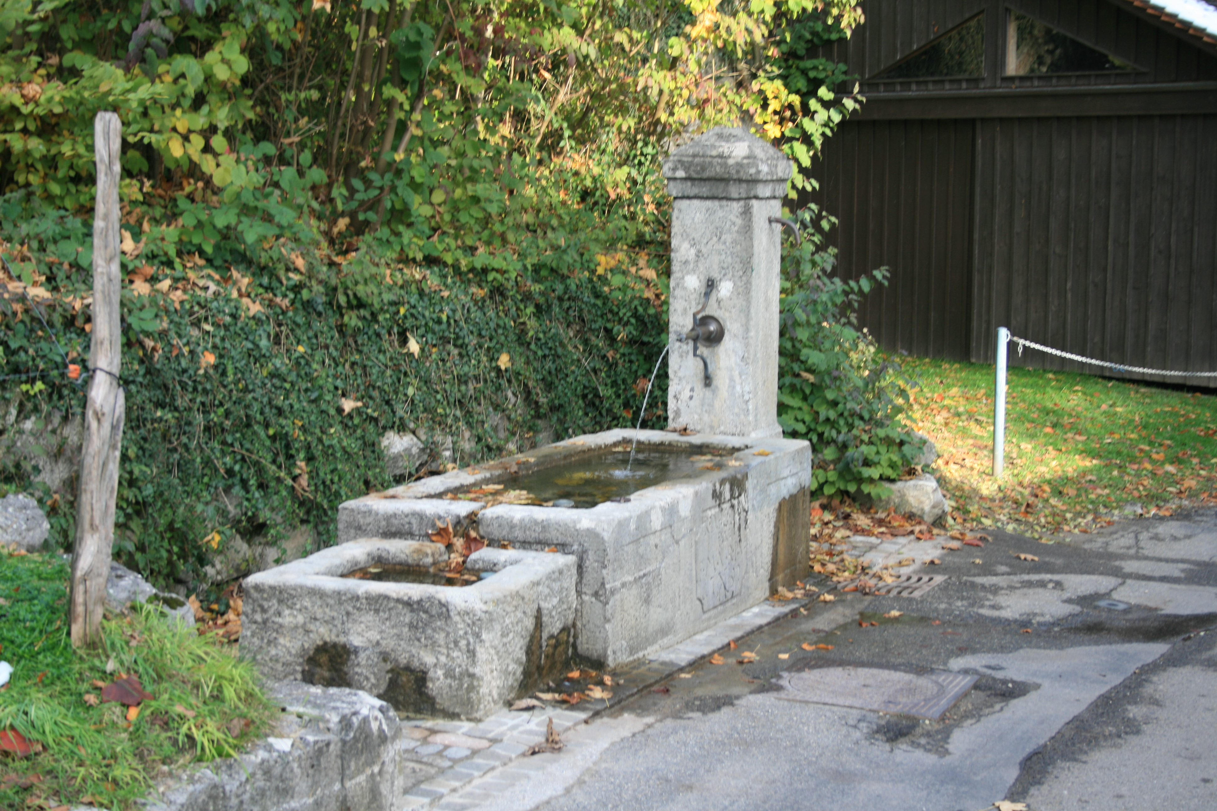 Fährlileh-Brunnen, Wettingen